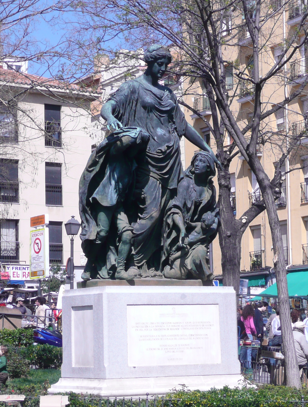 Estatua La protección de la orfandad y la viudez, en la plaza del Campillo del Mundo Nuevo (Rastro de Madrid). Obra de Viktor Tilgner, estuvo anteriormente en el edificio de la Equitativa de Madrid.